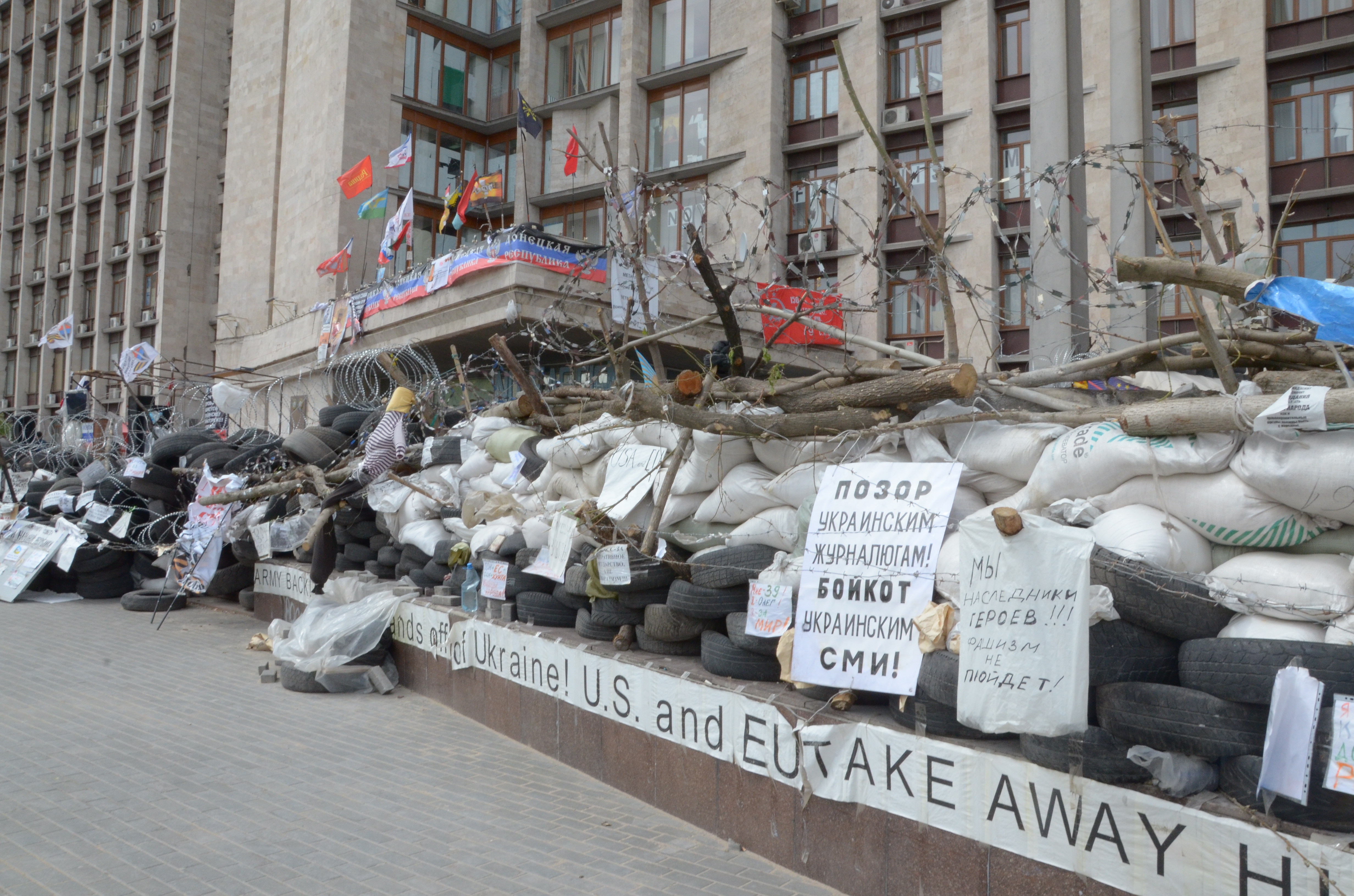 День Победы в Донецке